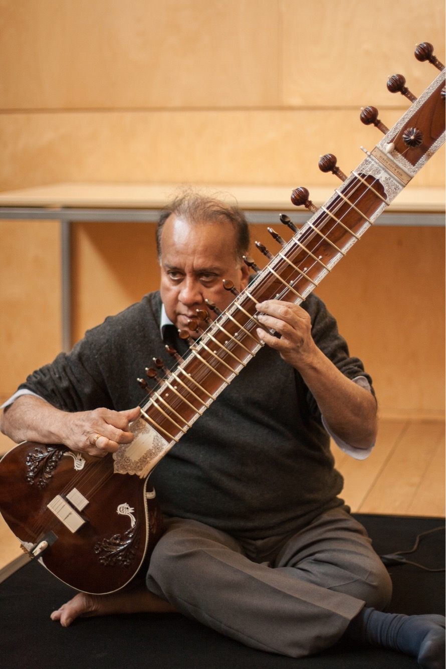 Intèrpret indi de sitar